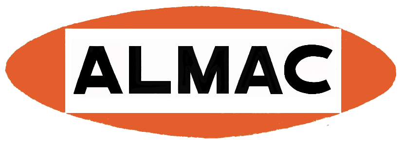 Emblema de supermercados Almac hasta mediados de los años 80s.